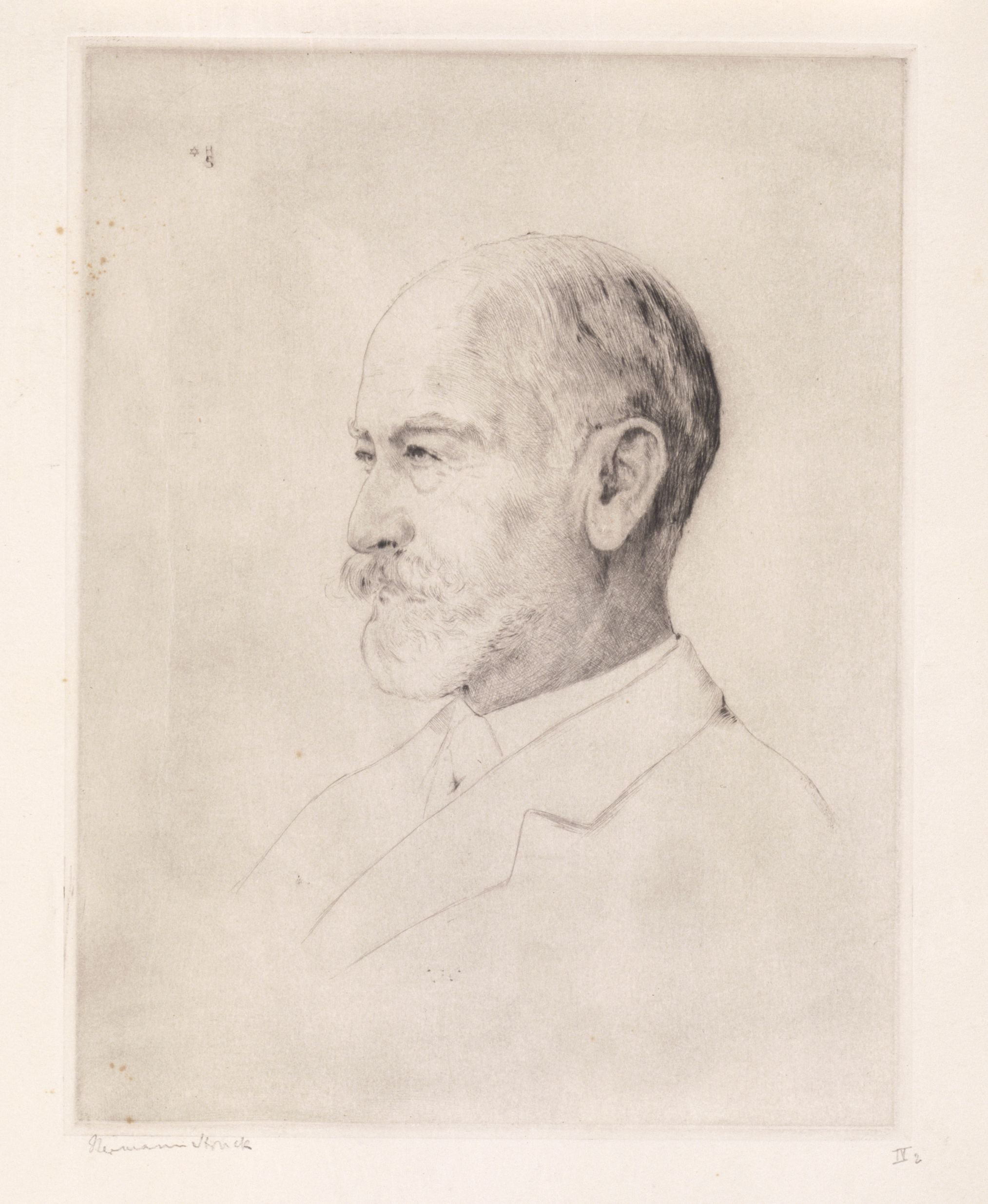 Artwork by Hermann Struck Dargestellte Person: Schiff, Jacob Henry (1847 - 1920), DNB-Link Datierung Display: 1913 Objektart: Radierung Schlagworte Inhalt /Geografie: Mann, Porträt, alter Mensch Schlagworte Kontext: Bankier